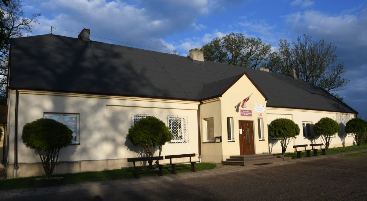 Szkoła i Przedszkole w Chotowie 2019 r.